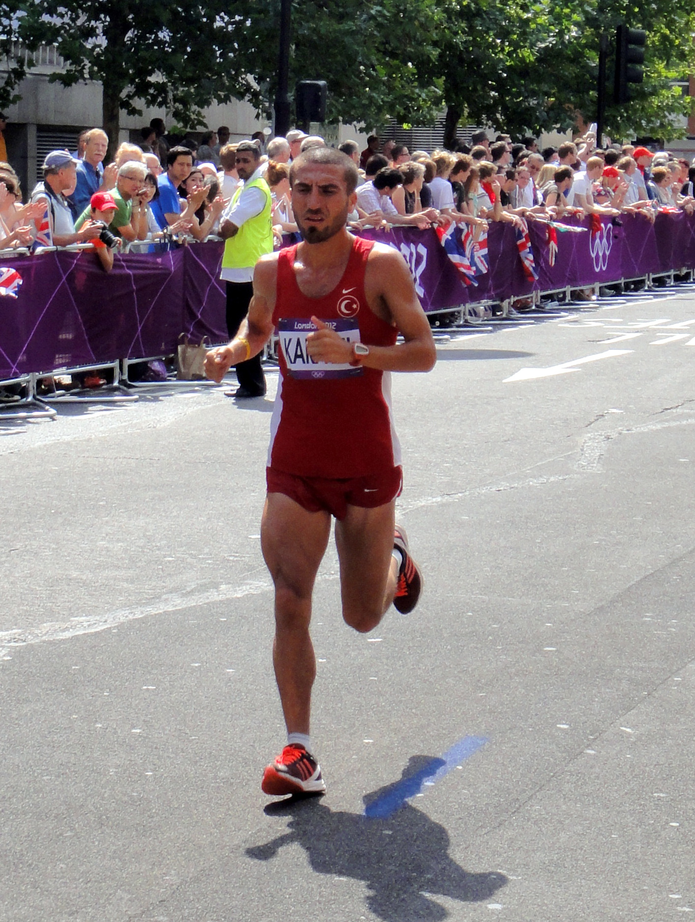 Bekir Karayel (Turkey) - London 2012 Men's Marathon